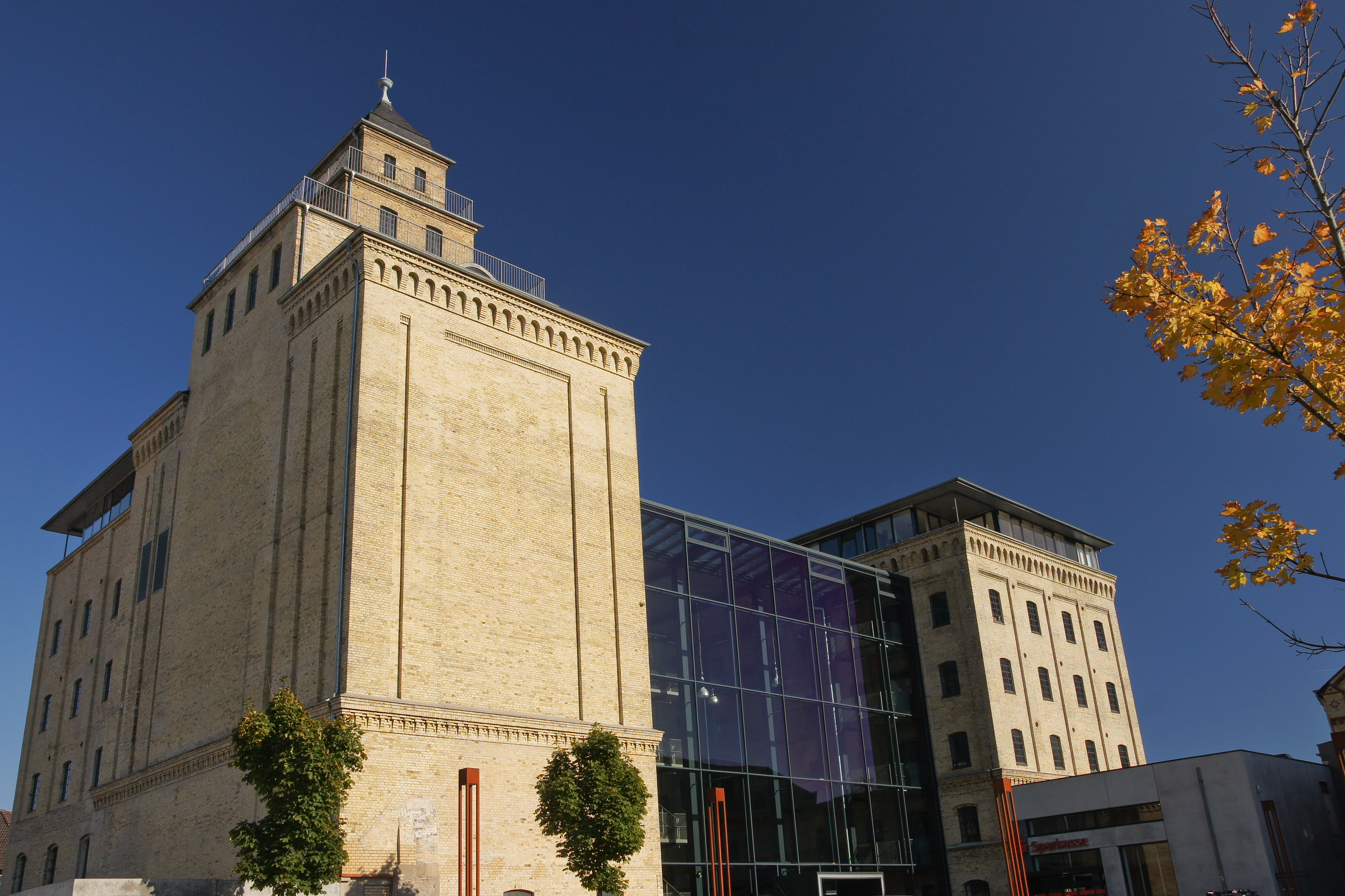 Flensburg-Neustadt, Neustadt 16, Flensburger Walzenmühle, Denkmal Nr. 12. Blick auf Westseite